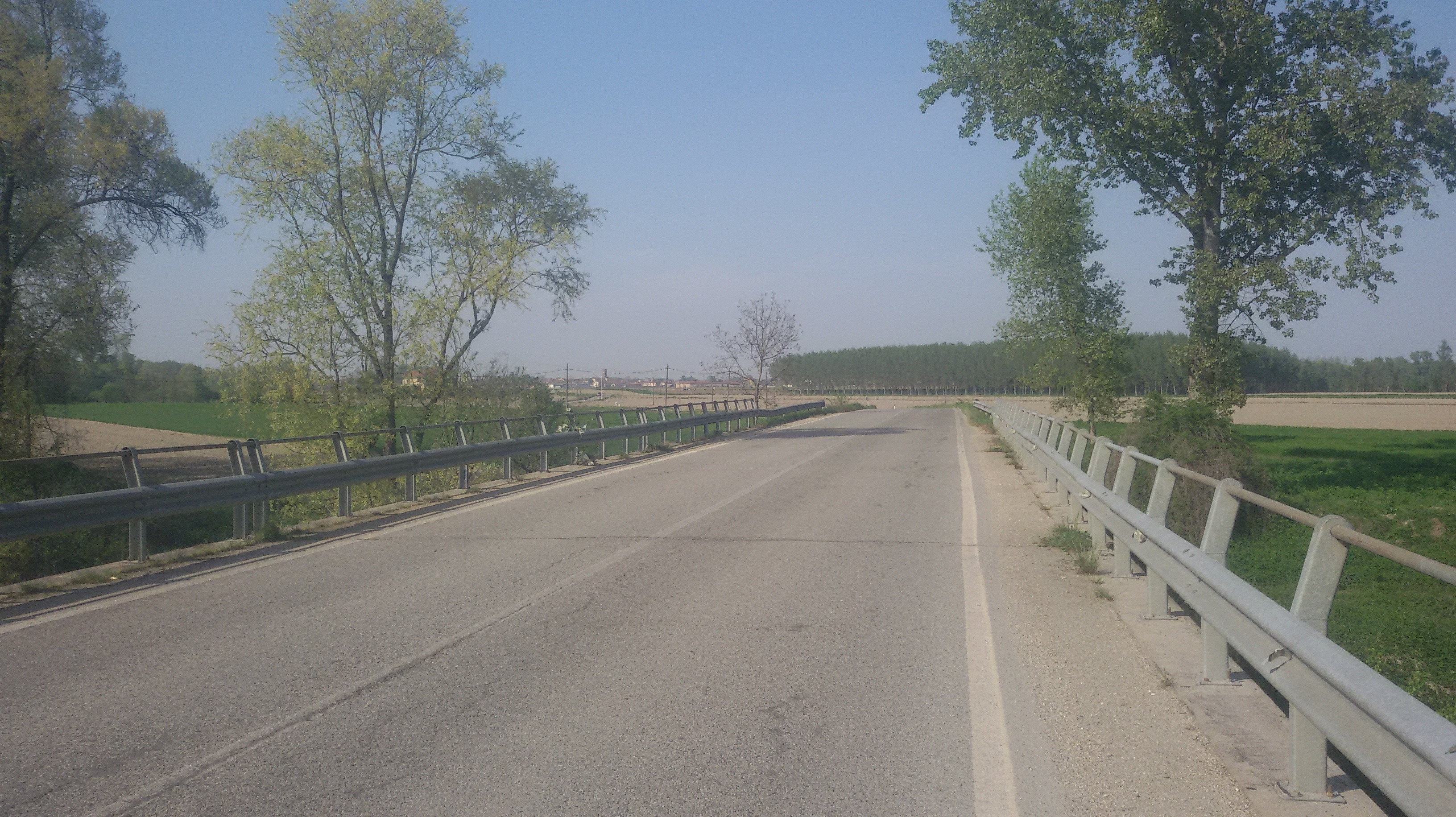 Ponte di Pancalieri e Faule